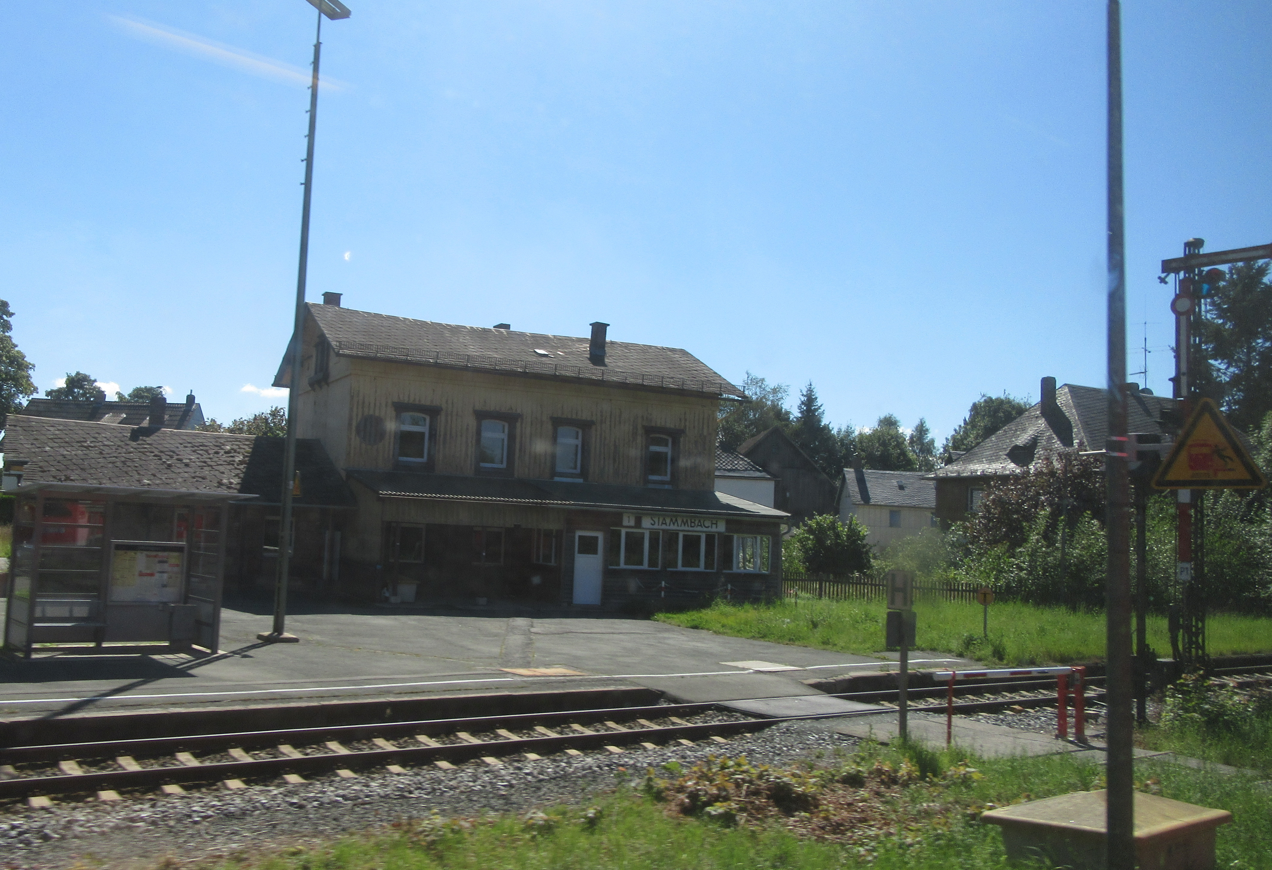 Bahnhof Stammbach, das Bild wurde aus einem fahrenden Zug geschossen. Dementsprechend sind Spiegelungen vorhanden.